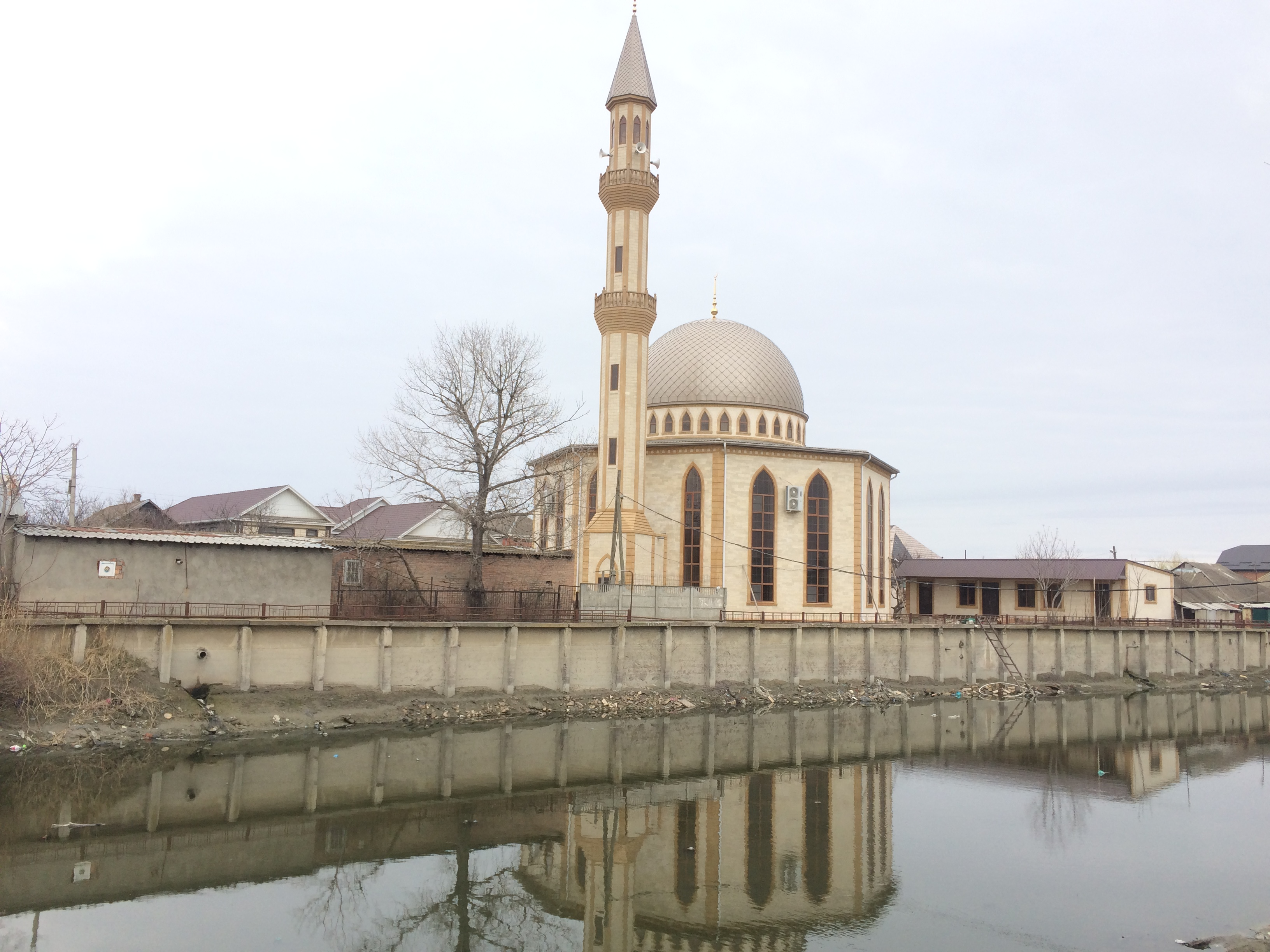 Городская мечеть в Кизляре, заново отстроенная после пожара 2015 года.